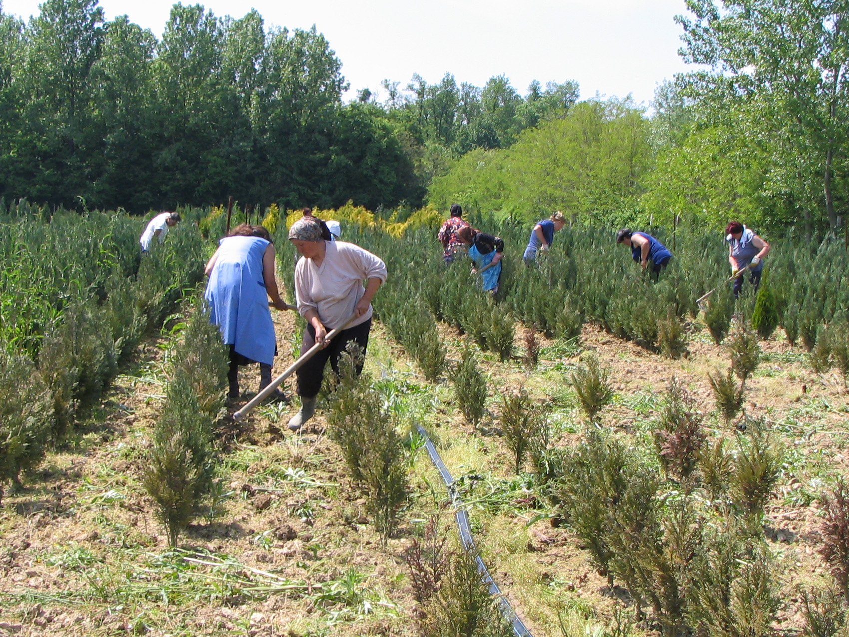 Окопавање у одељку за формирање четинара, хортикултурног расадника Милана Топаловића, Липолист, Србија (аутор: Михаило Грбић).